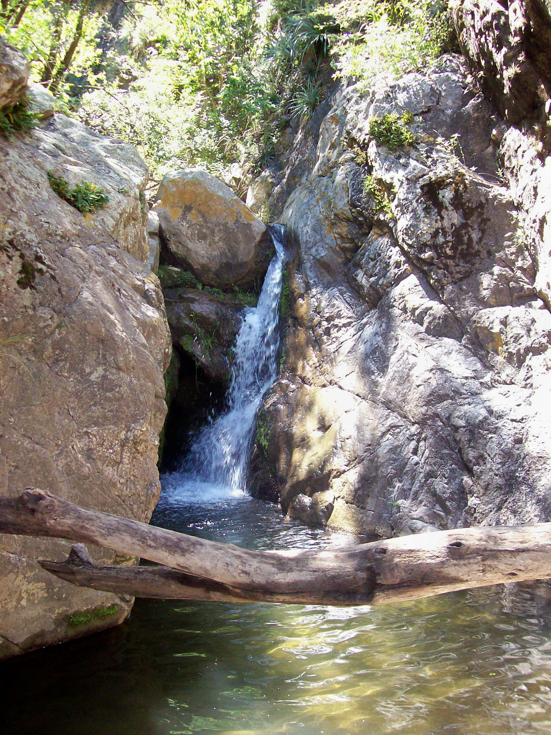 Cascada del Ángel en Vaquerías, Valle Hermoso, pcia. de Córdoba, Argentina. Las coordenadas dadas son aproximadas, con (estimo) no más de 300 m de error de la posición correcta